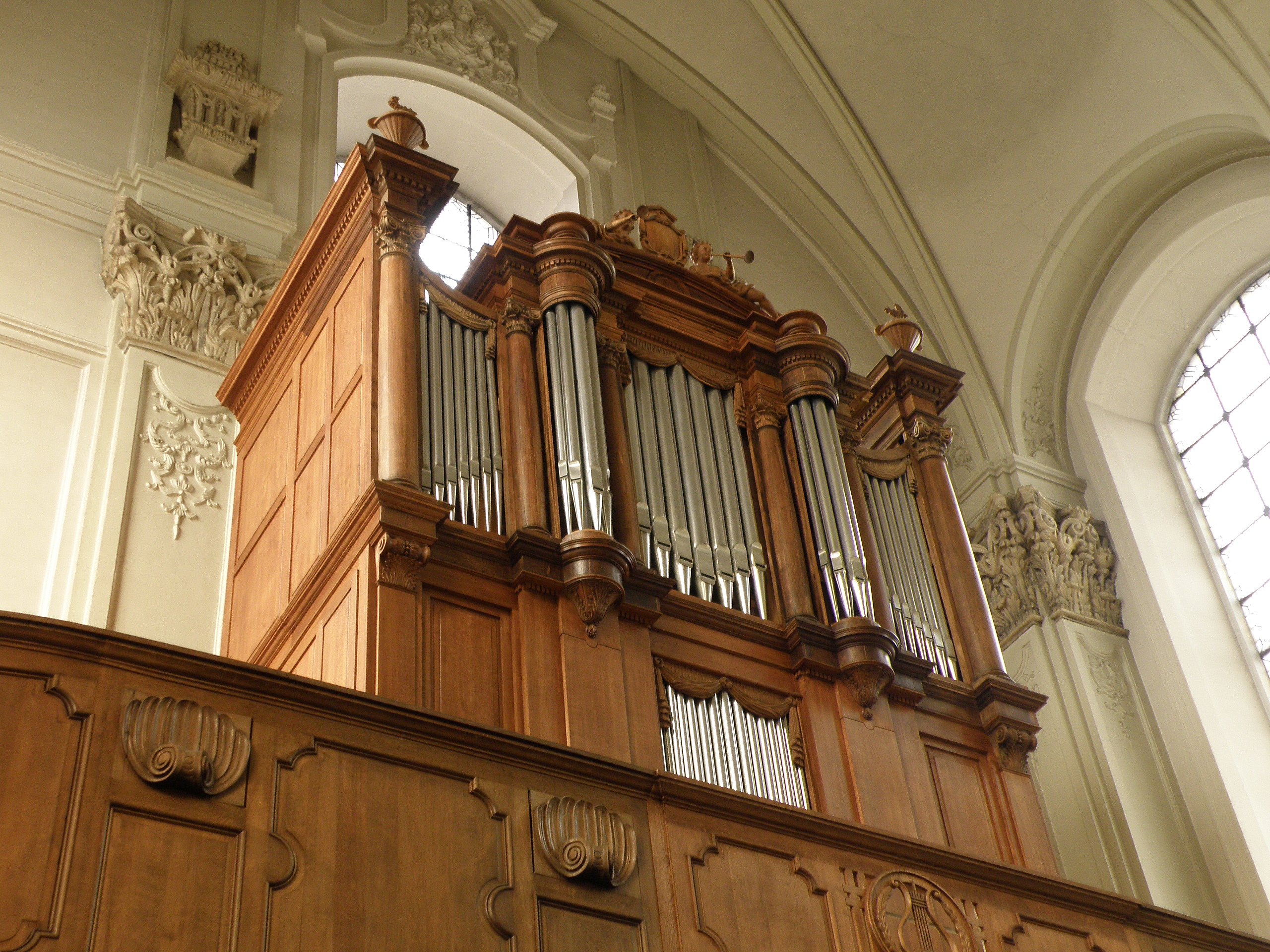 Saint-Trond (en néerl. Sint-Truiden, prov. du Limbourg, Belgique). Église Saint-François-Solan, ou église des Franciscains (Minderbroederskerk), sise Minderbroedersstraat.